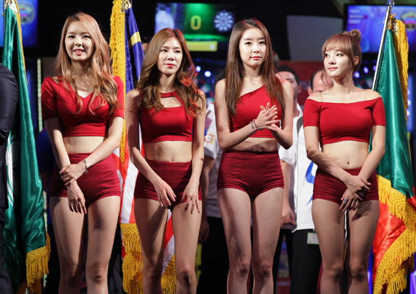 스텔라(Stellar) 2015 피닉스 섬머 페스티벌 일산 킨텍스